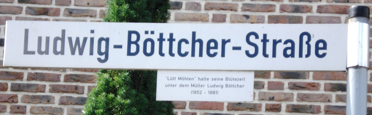 Schild - Ludwig-Boettcher-Str. in Bad Schwartau